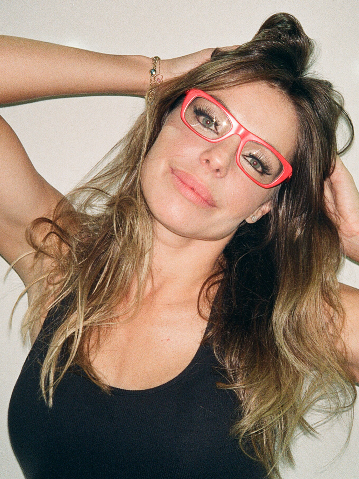 feat. Daniella Cicarelli